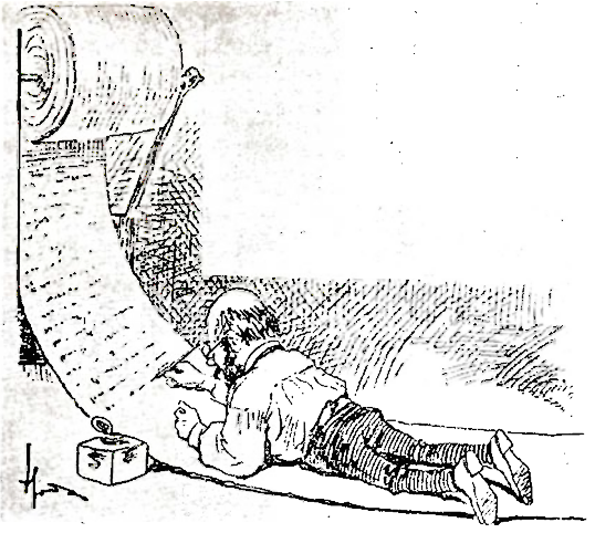 Карикатура на Эмиля Золя в русском журнале «Стрекоза» с подписью: «Золя печатает во французских газетах своё воззвание к русской печати об установлении литературной конвенции».